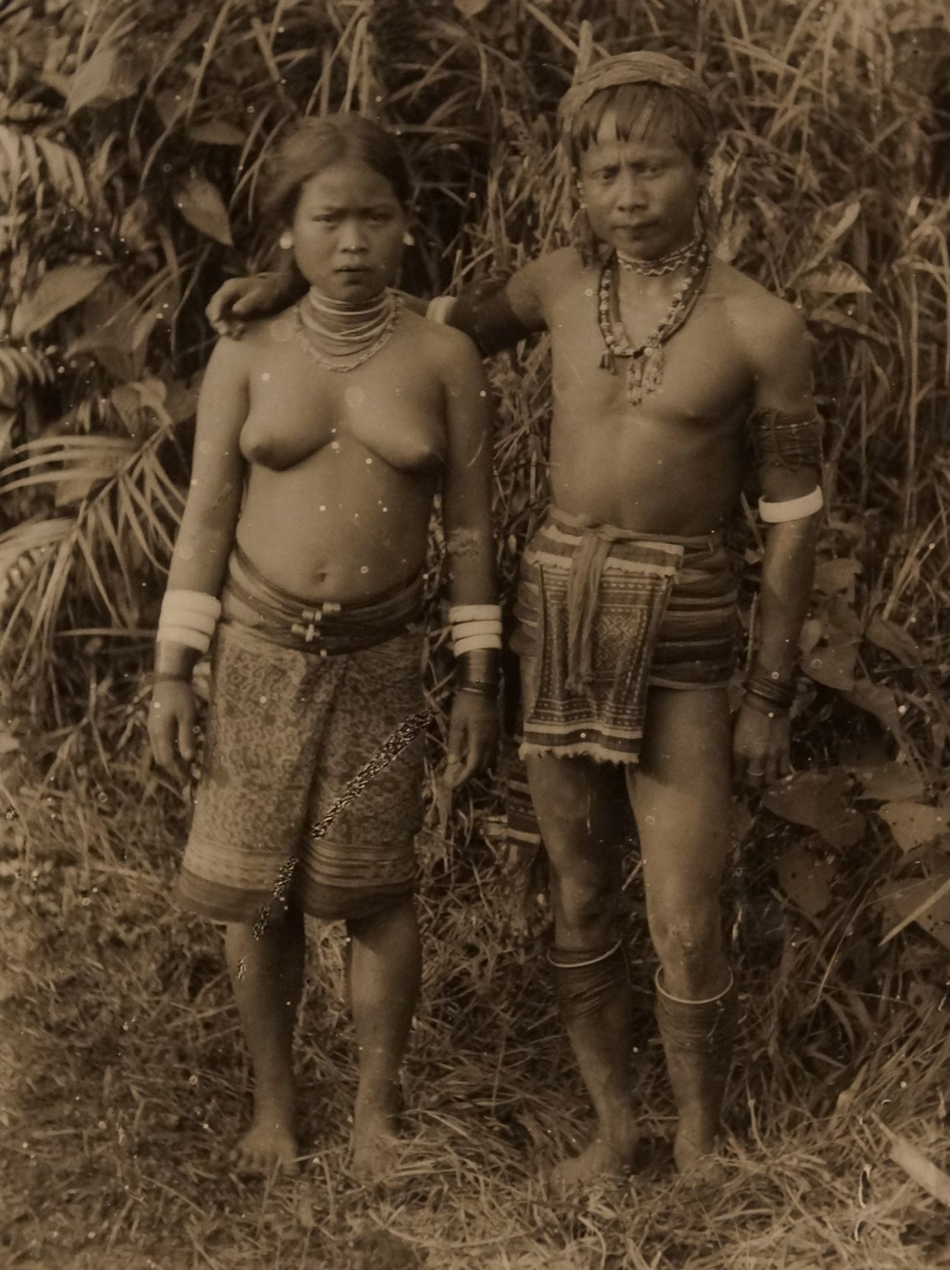 Bernisches Historisches Museum, Hantoek-Dayak Ehepaar. Borneo, 1893-94 von hinten